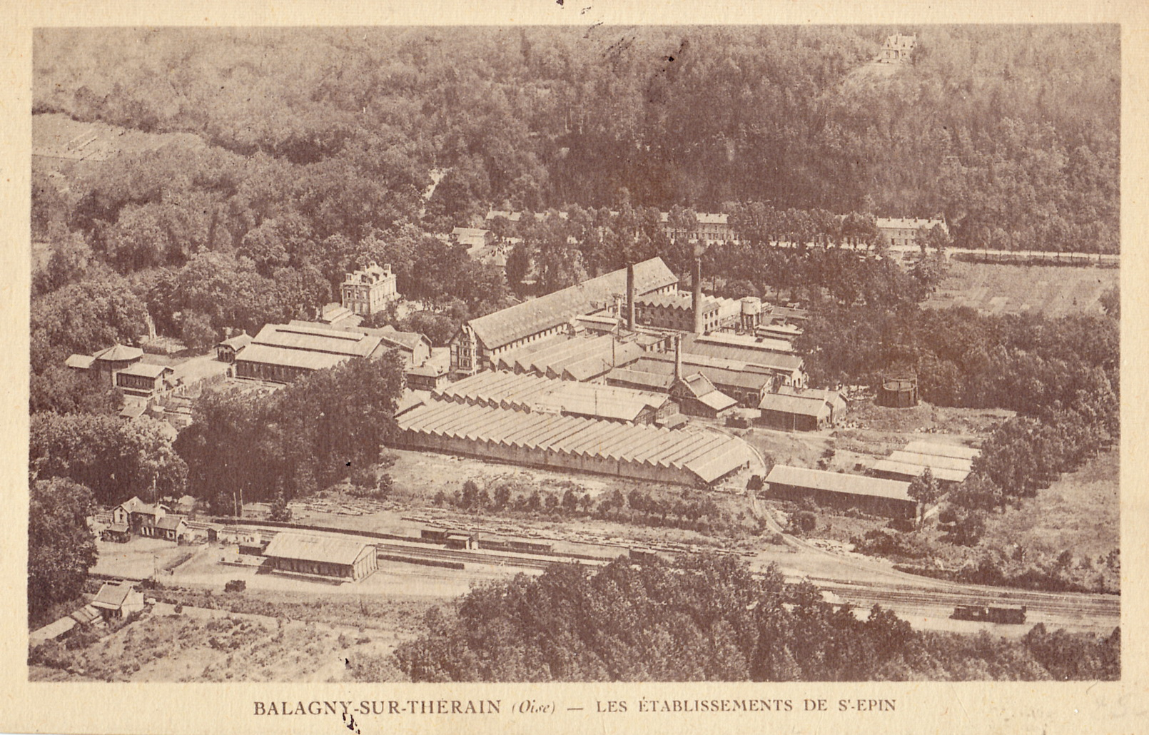 Carte de commerce ancienne éditée par la Société anonyme des filatures et teintureries de Saint-Ėpin : BALAGNY-SUR-THERAIN - Ėtablissement de Saint-Ėpin